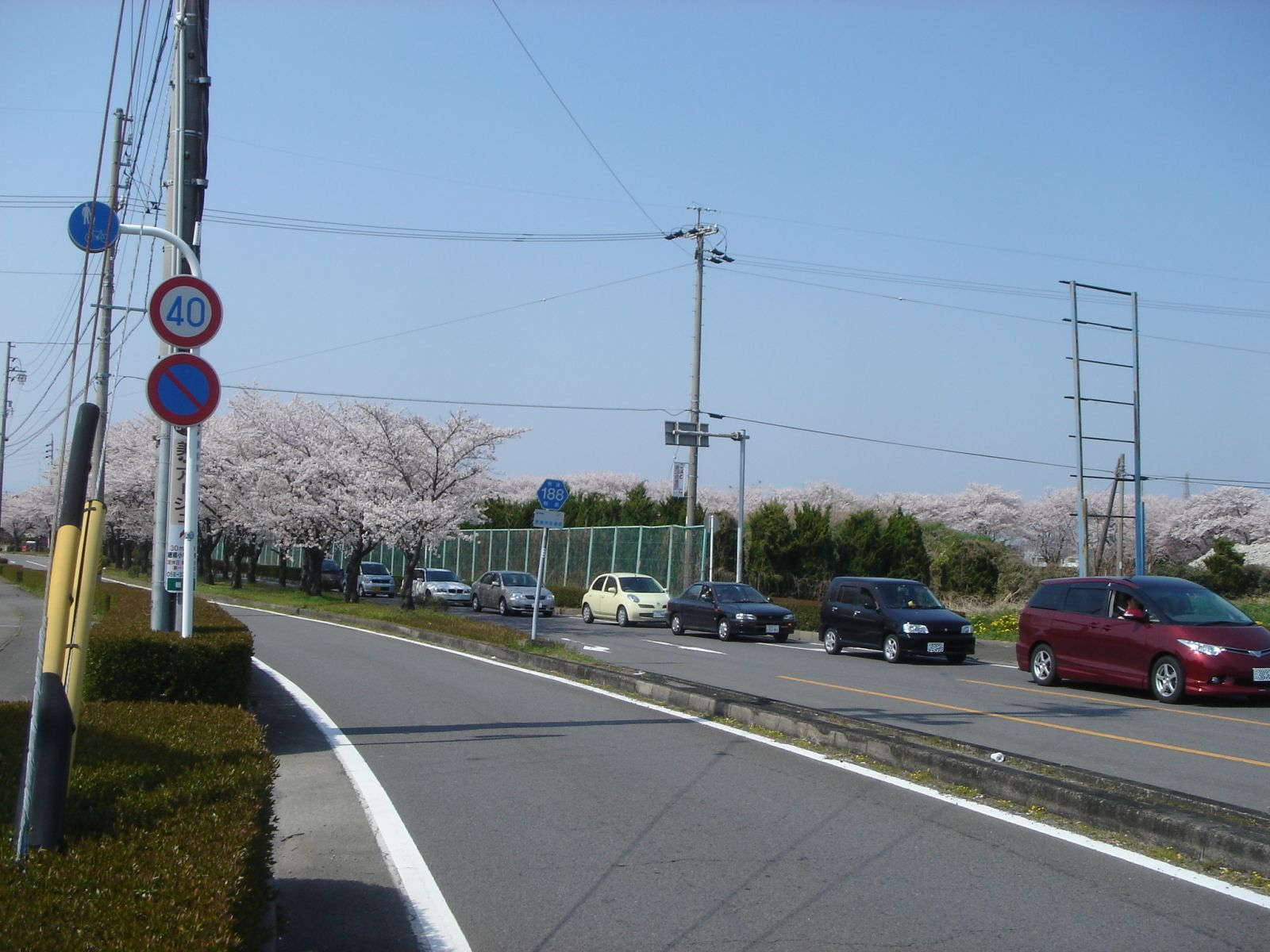 Gifu Prefectural Road 188(岐阜県道188号穂積停車場線),Mizuho,Gifu,Japan(岐阜県瑞穂市)の終点。国道21号の上穂積交差点から北側を撮影。